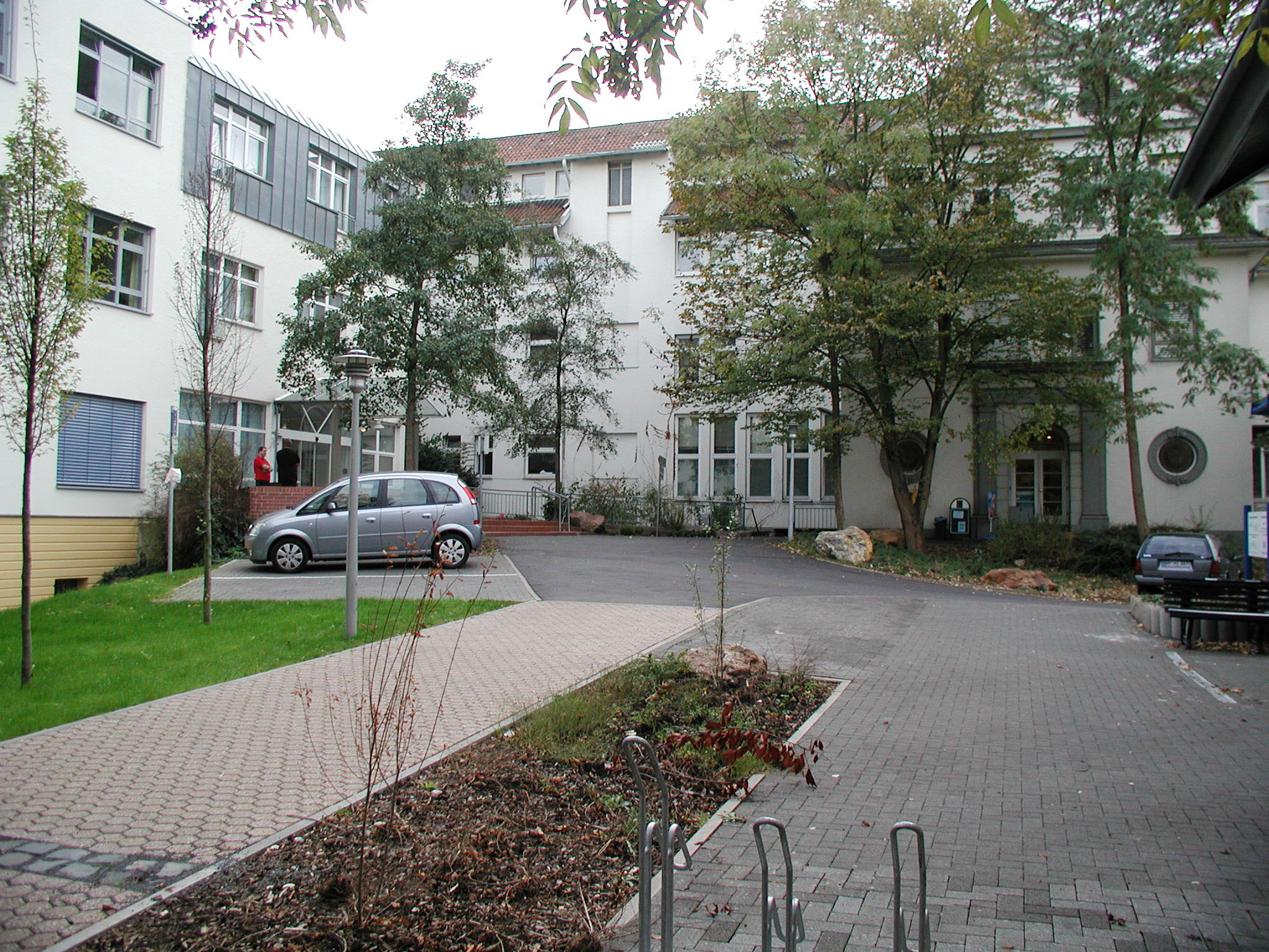 Hürth-Hermülheim, SANA Krankenhaus